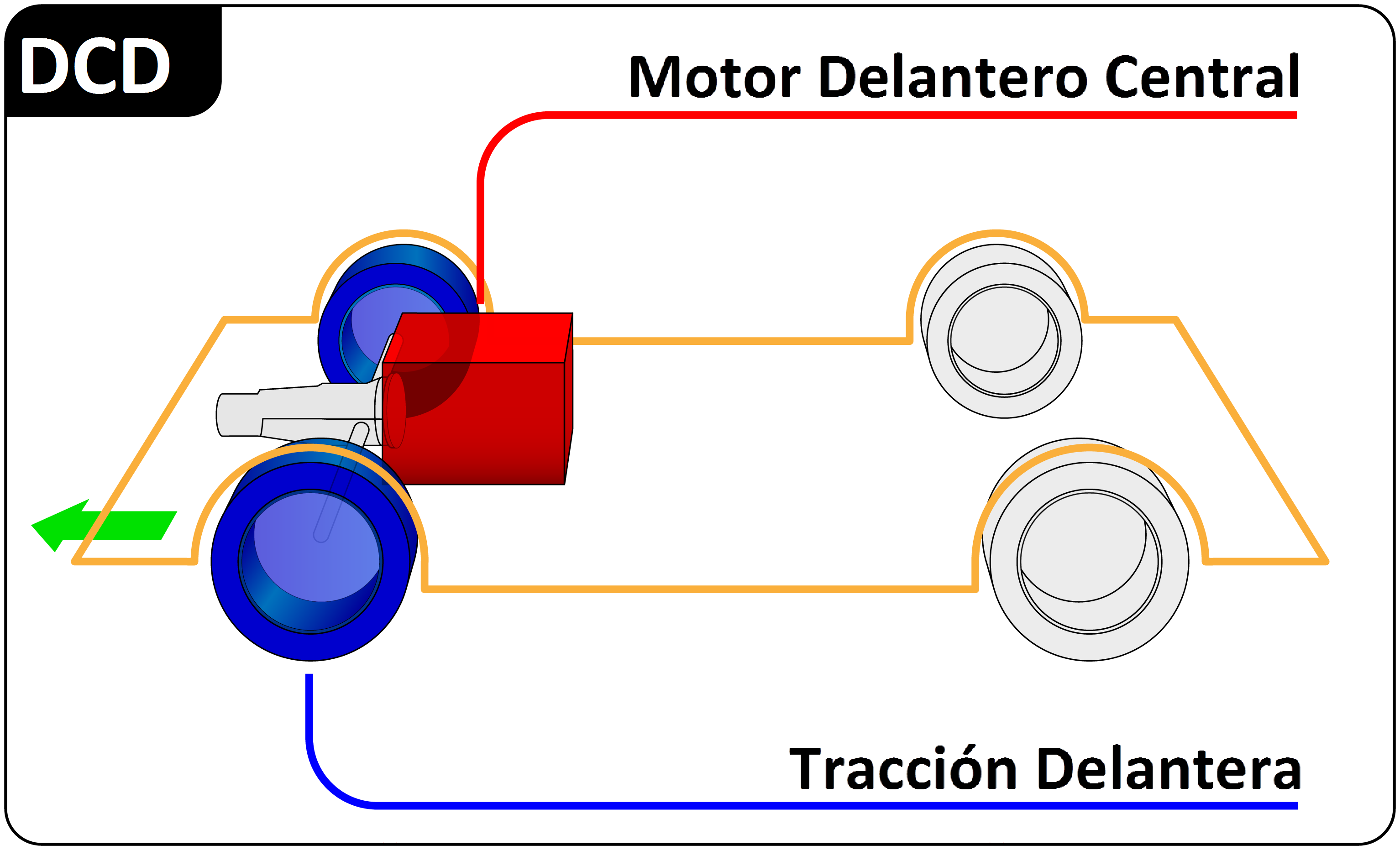 Diagrama de un vehículo con delantero central y tracción delantera (DCD)